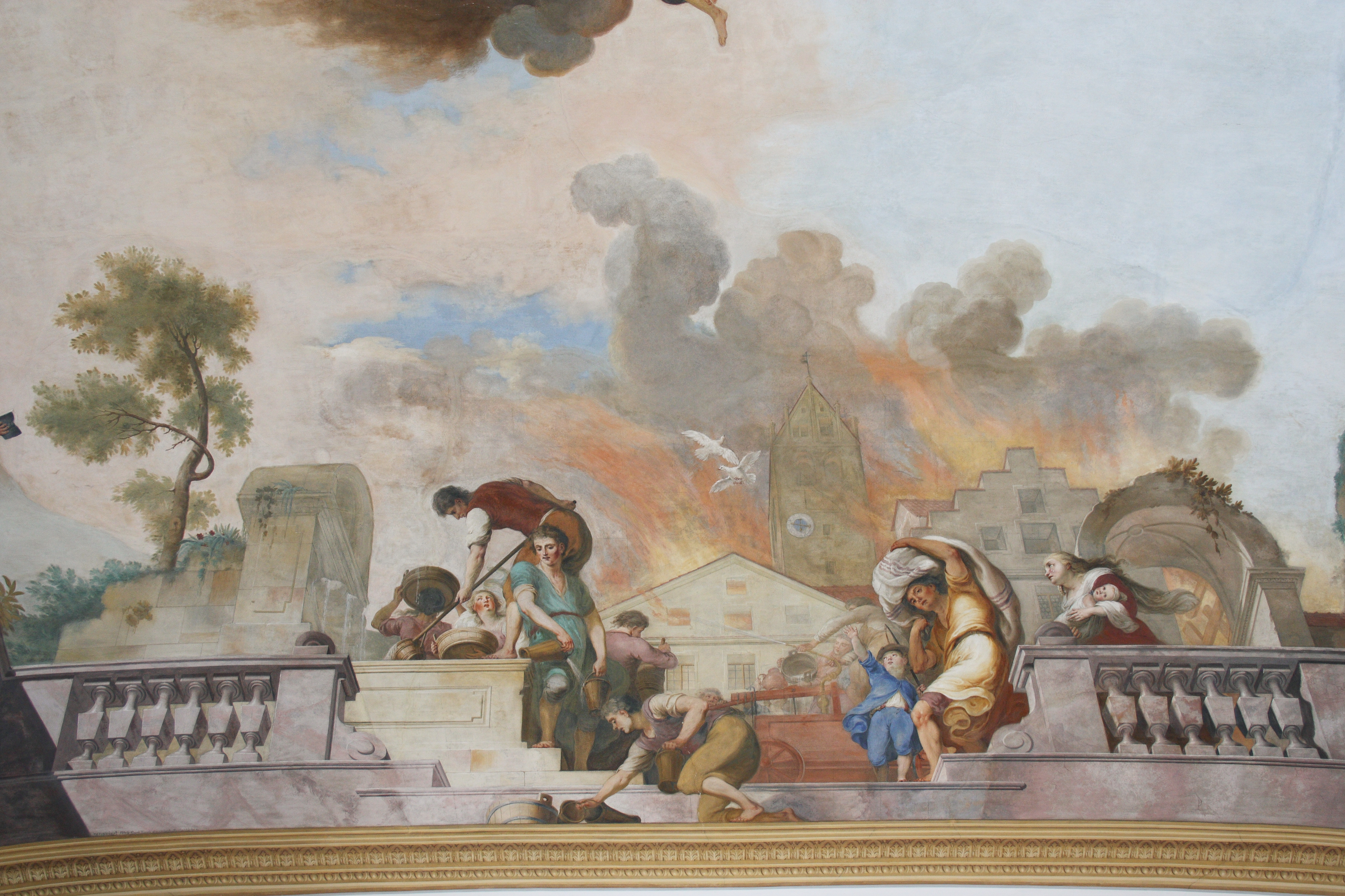 Katholische Pfarrkirche St. Ulrich und Martin in Wittislingen im Landkreis Dillingen an der Donau, Szene des Langhausfreskos über dem Chorbogen mit der Darstellung der Feuersbrunst in Wittislingen im Jahr 1783, von Konrad Huber (1787)